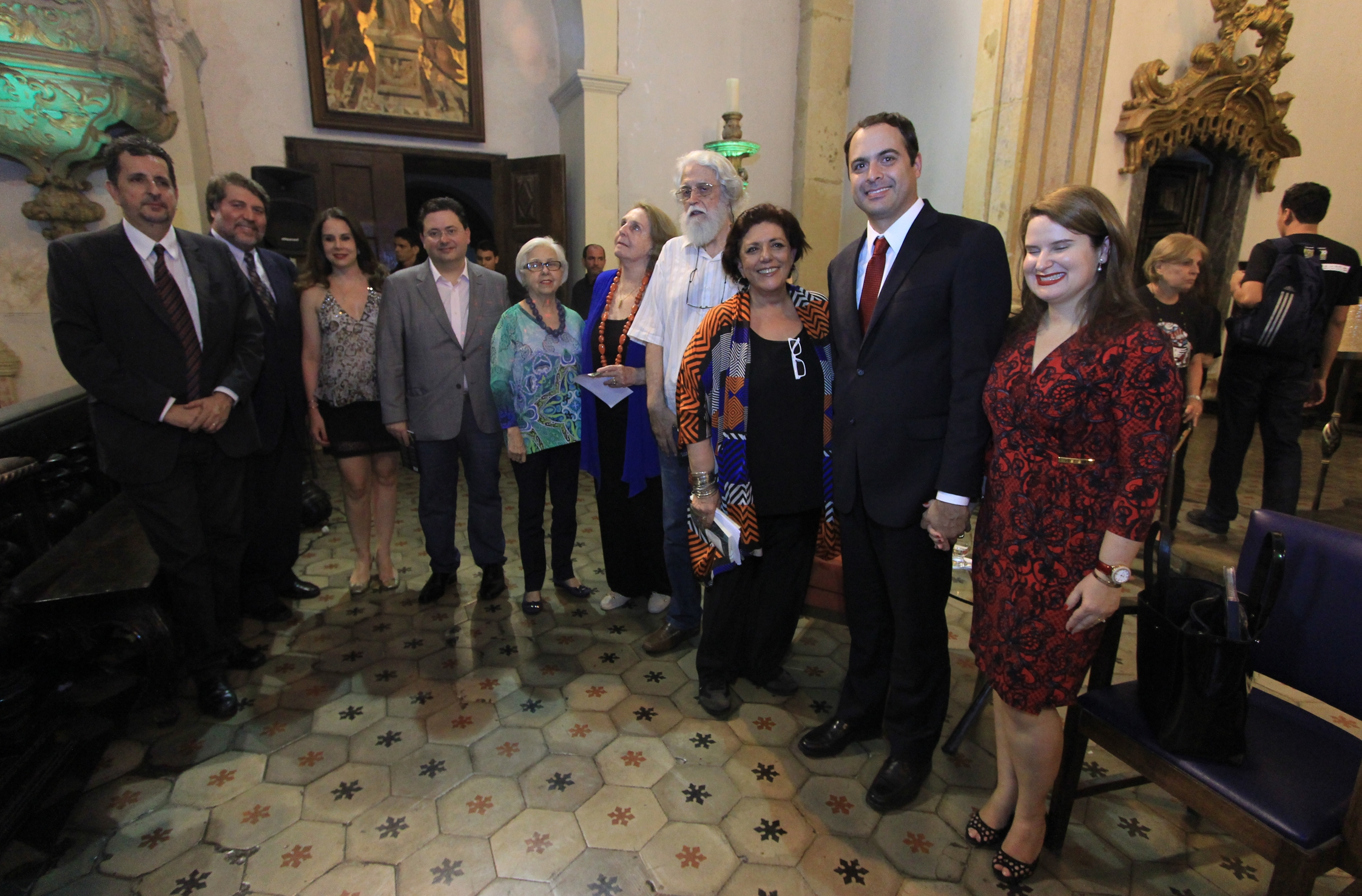 Português do Brasil: Fliporto 2014 - Olinda, Pernambuco, Brasil